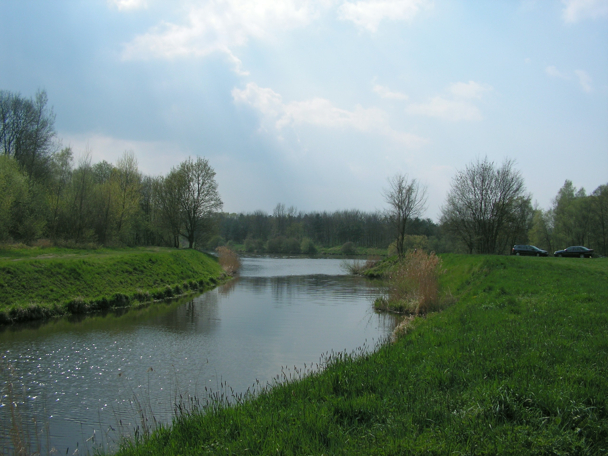 Ústí Doubravy do Labe západně od Záboří nad Labem v okrese Kutná Hora